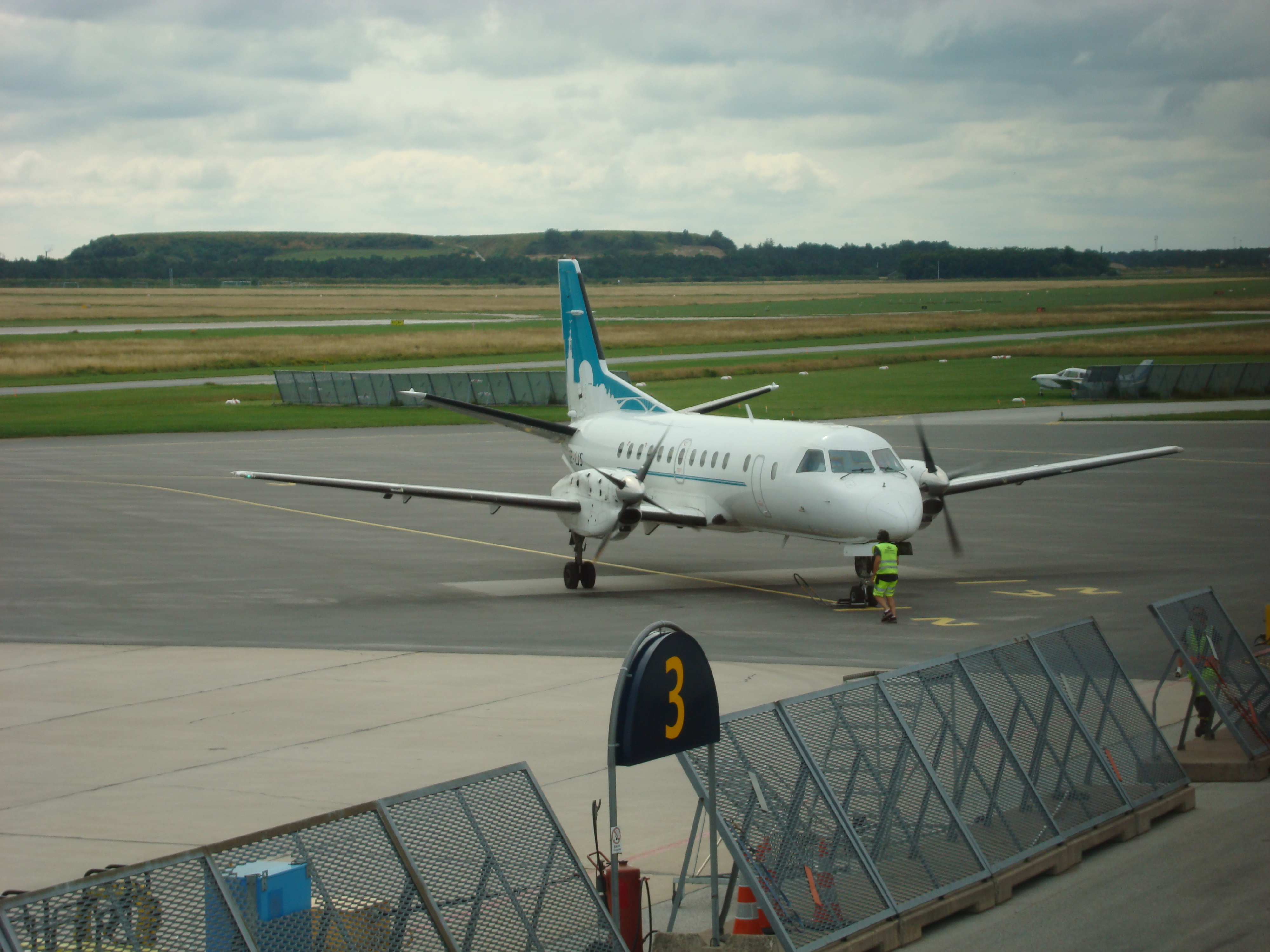 En Saab 340 från Gotlandsflyg på Visby Airport